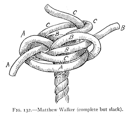 Project Gutenberg License